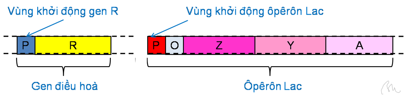 Thành phần của Operon lac